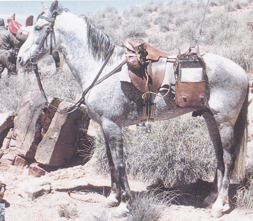 Cheval barbe gris perle équipé d'un harnachement pour officier